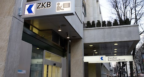 بنك بانتون زيورخ